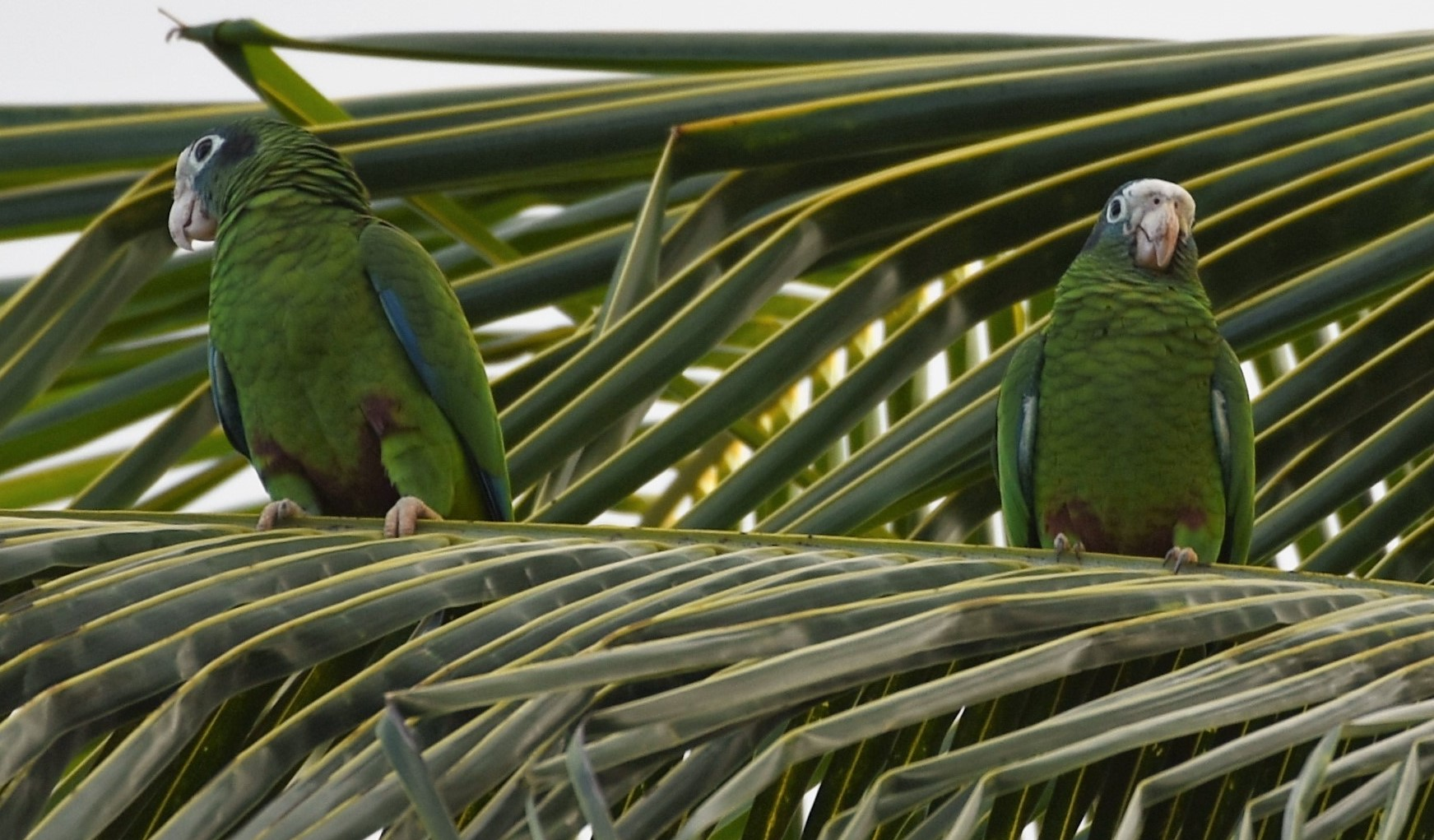 Blaukronenamazone (Amazona ventralis) Bávaro, Punta Cana, Dominican Republic